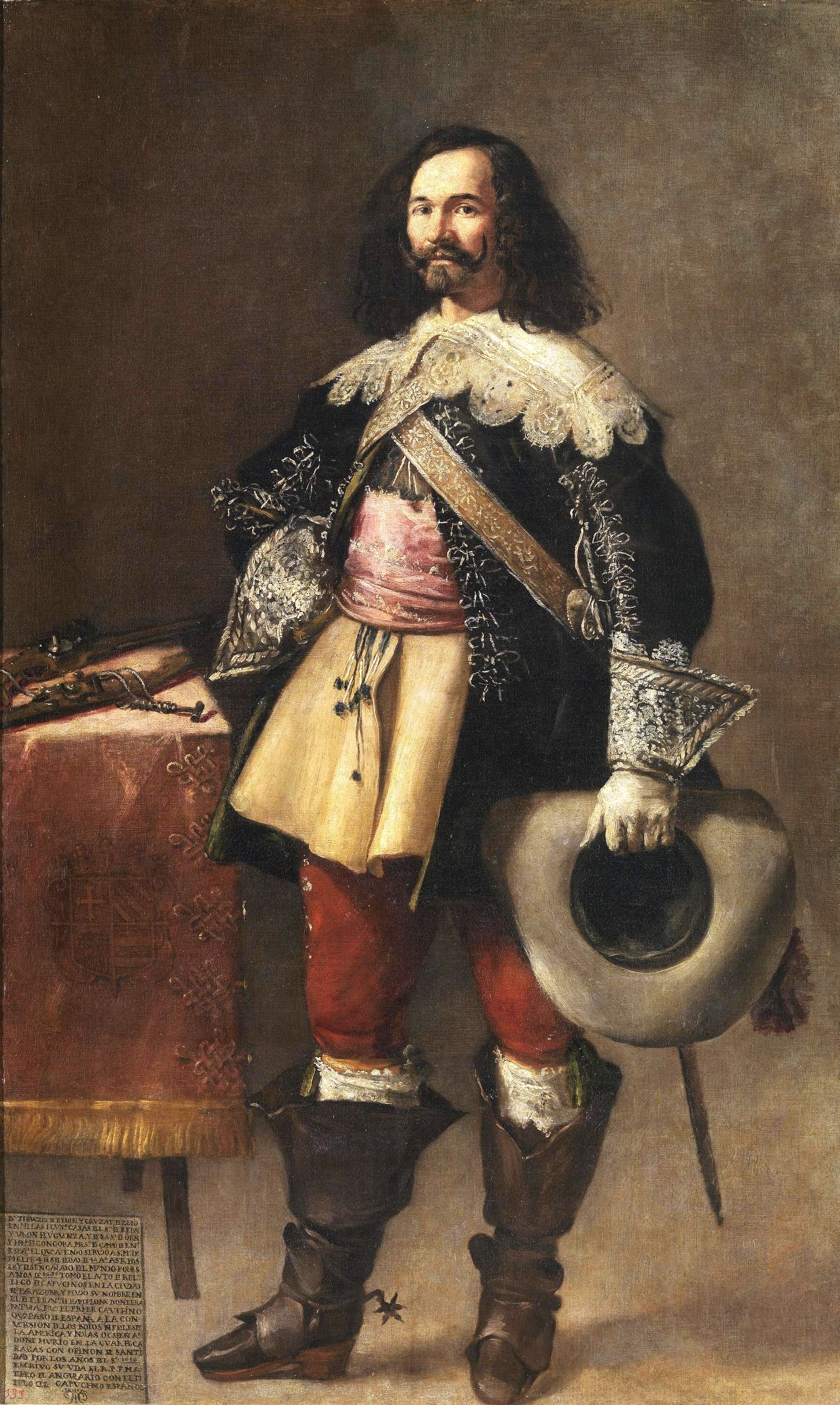 Retrato del militar y religioso español Tiburcio de Redín y Cruzat (1597-1651), barón de Bigüezal y caballero de la Orden de Santiago.